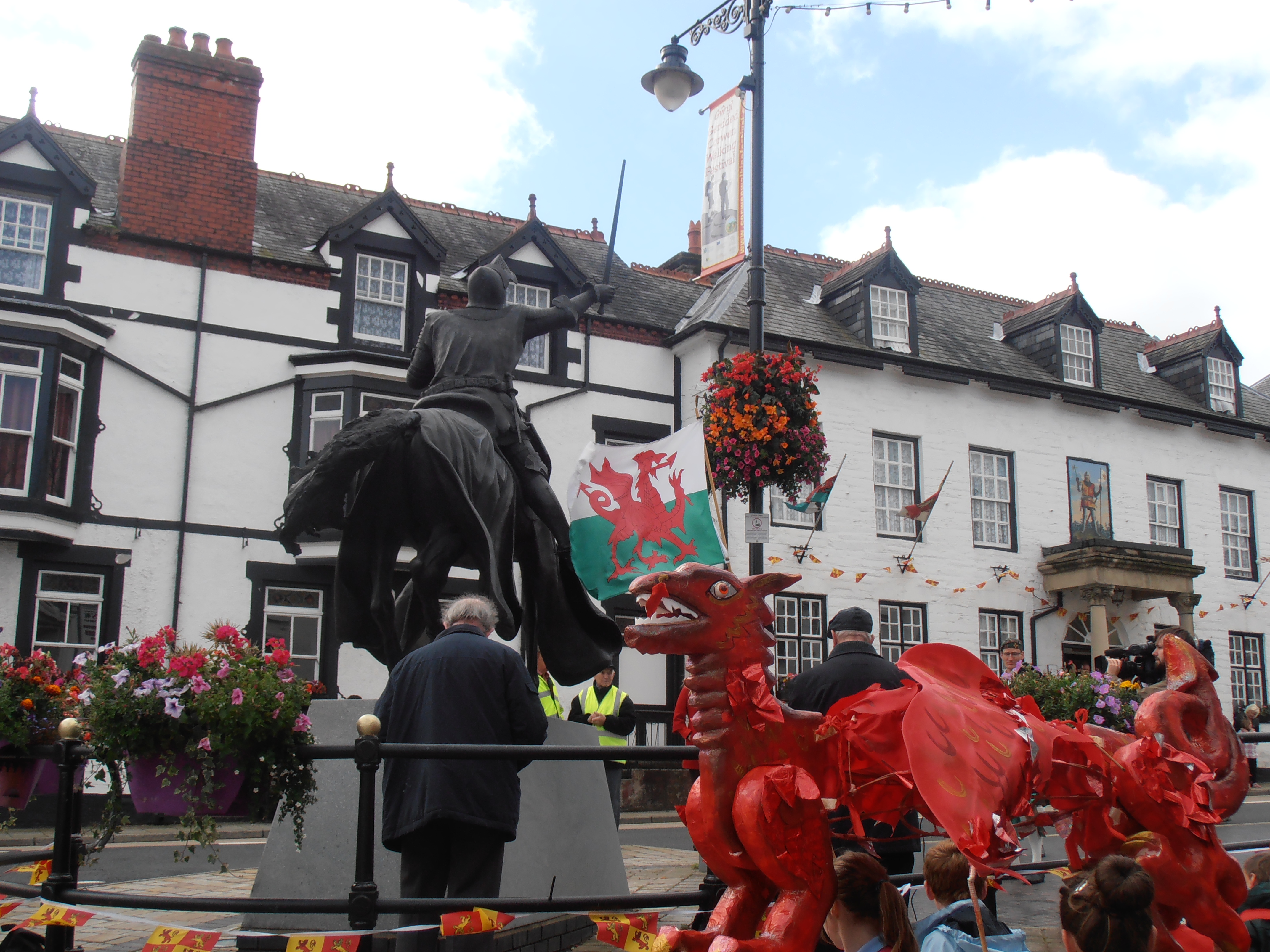 Dathliadau Owain Glyn Dwr yng Nghorwen; Medi 16 2013. Sir Ddinbych. Band Cambria: drymwyr a ffliwt.